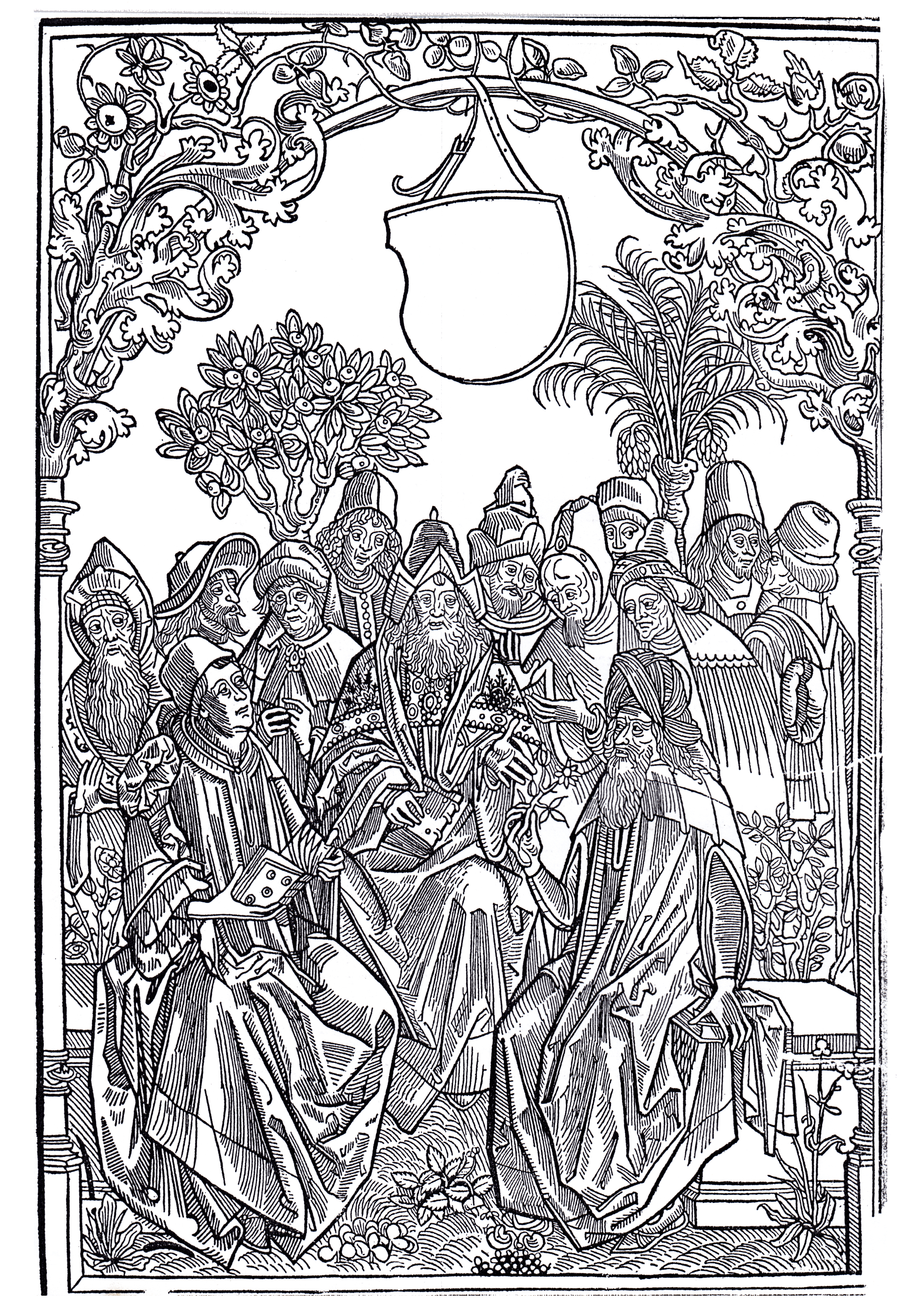 Titelblatt